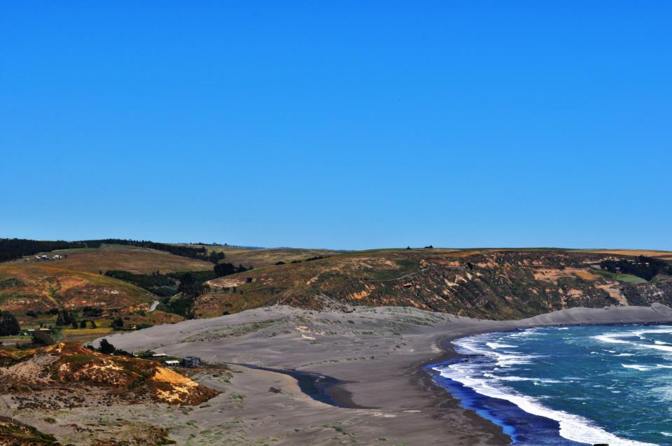 La Boca de Rapel, comuna de Navidad, Chile.